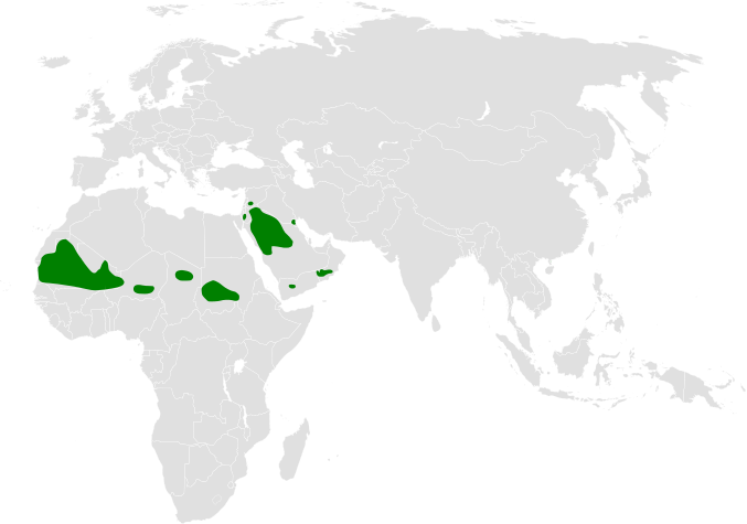 Eremalauda dunni distribution map, based on